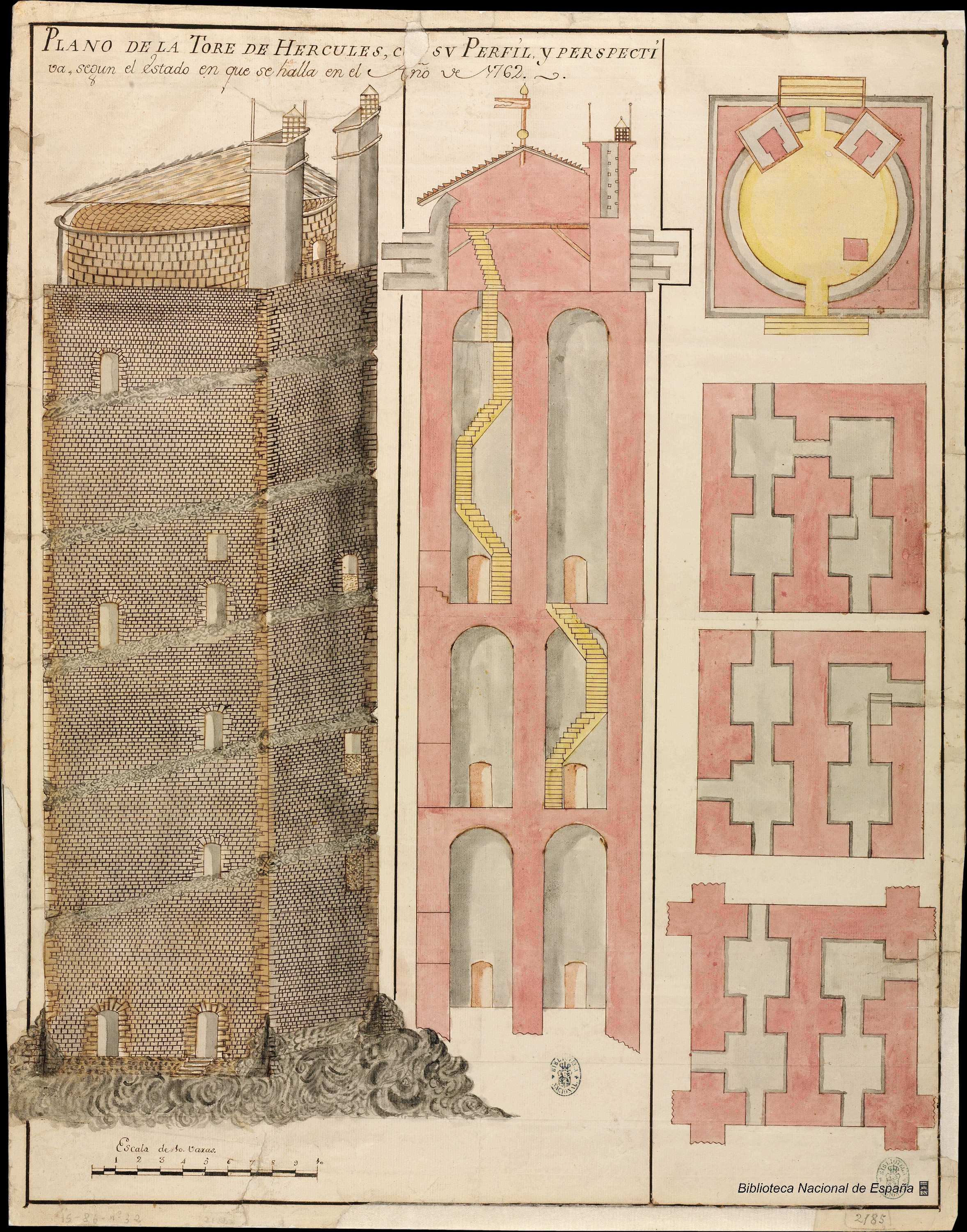 Inscripción manuscrita a pluma y tinta marrón del borde superior: "PLANO DE LA TORE DE HERCULES, c SU PERFIL Y PERSPECTI / va, segun el estado en que se halla en el Año de 1762" Bello Diéguez identifica este dibujo como el original que José Cornide envió al Padre Flórez en 1762 y que éste mandó grabar para su inclusión en: España Sagrada. t. XIX El P. Enrique Flórez encarga en 1762 a José Cornide la realización de un dibujo sobre el estado de la torre y otro de la inscripción de la lápida que se encuentra junto a ella